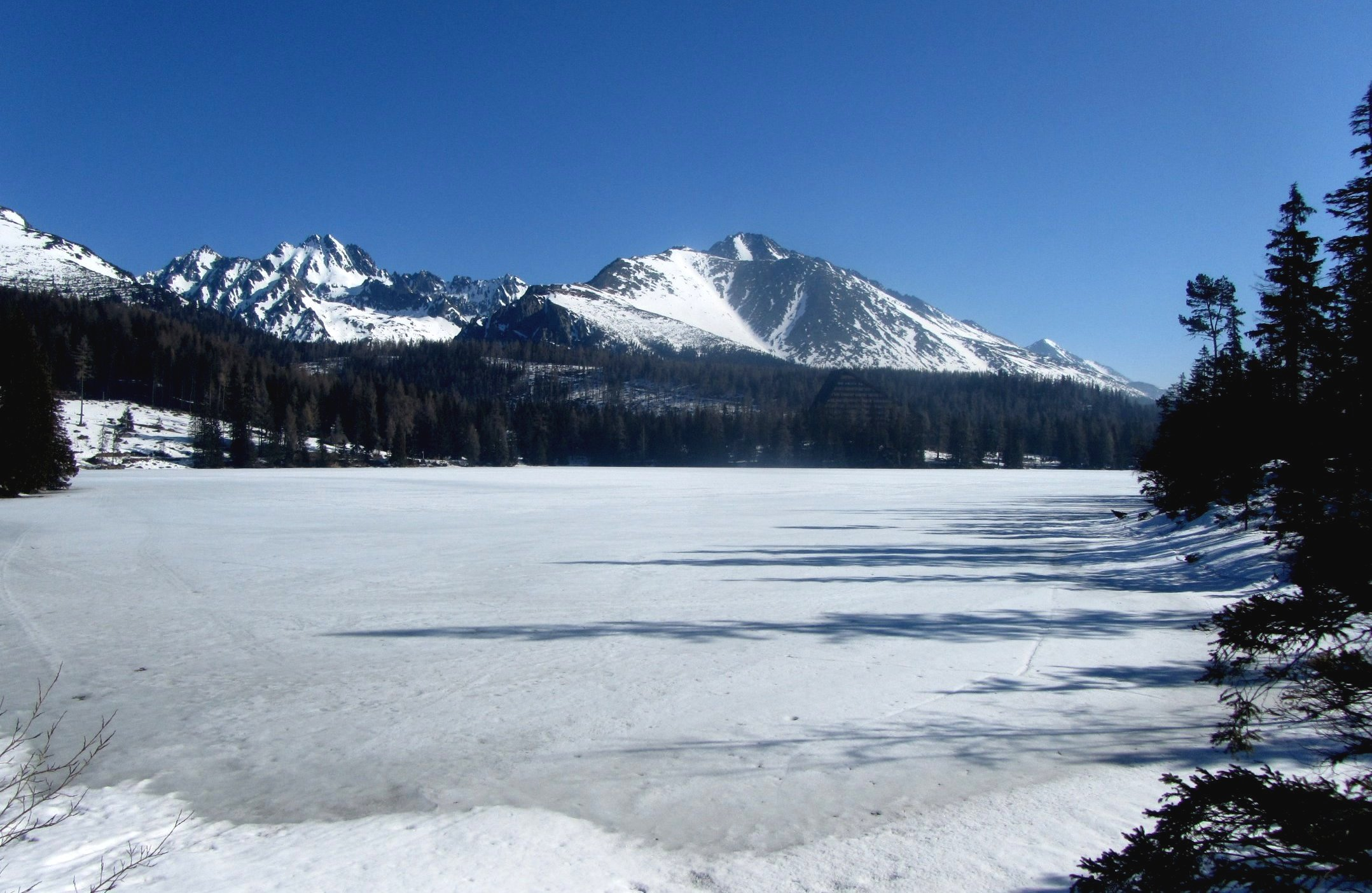 Sczyrbskie Pleso